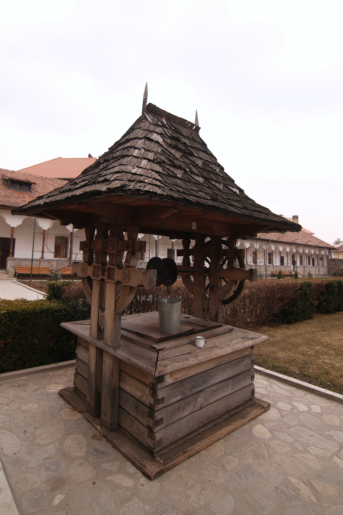 Fântână la Mânăstirea Negru Vodă 07